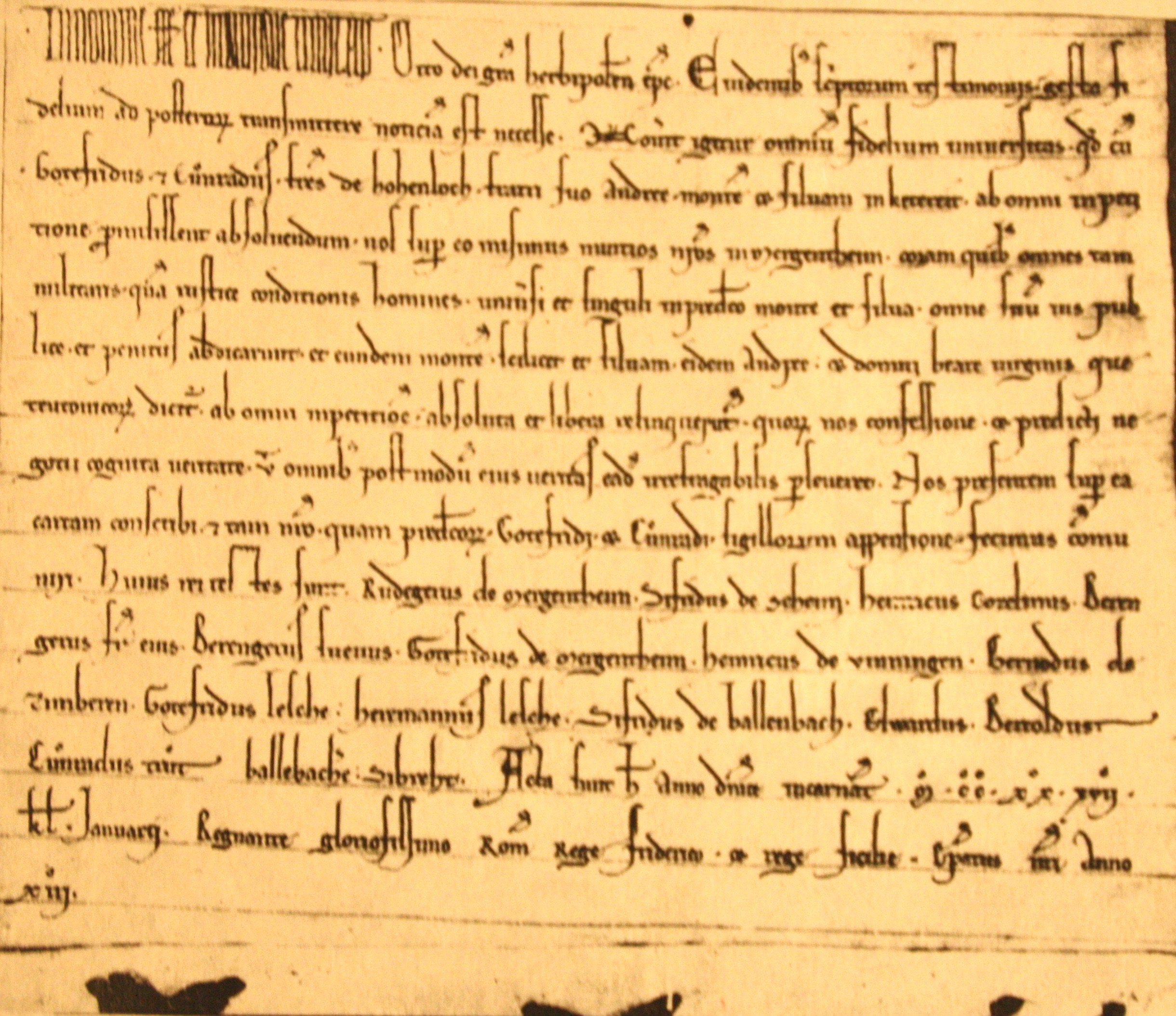 Zeugenurkunde 1219